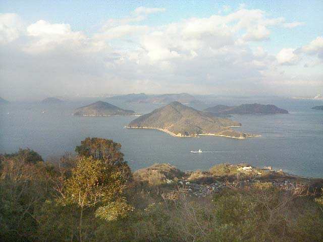 紫雲出山から見た粟島全景 画像形式 jpeg、横640×縦480ピクセル。 投稿者本人による撮影（2005年2月26日）。